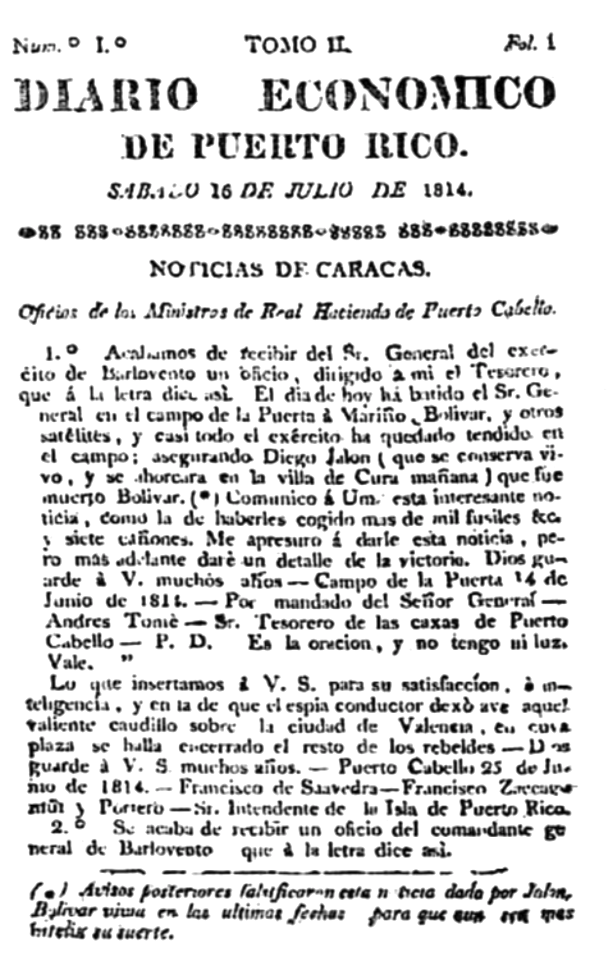 Front page of newspaper "Diario Económico de Puerto Rico" of San Juan, Puerto Rico